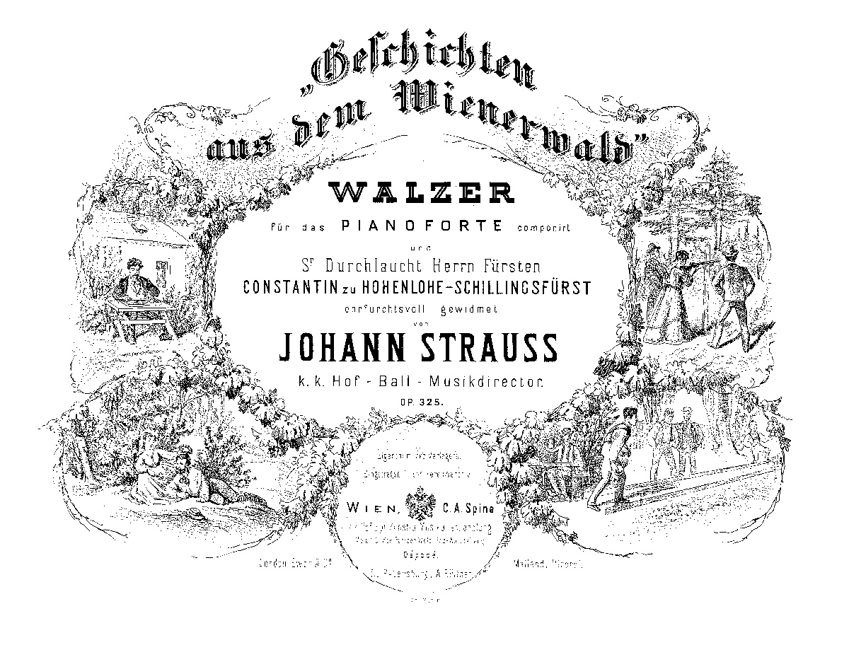 ワルツ『ウィーンの森の物語』